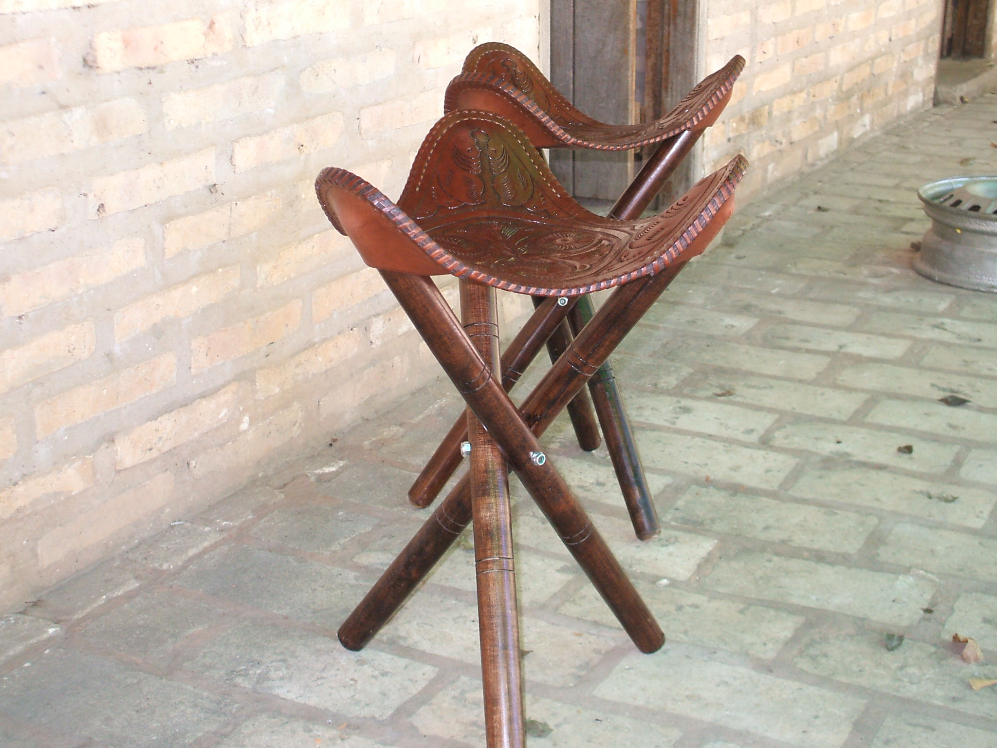 Artesania en cuero